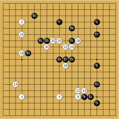 1990年11月12日王座戦挑戦手合五番勝負第4局 加藤正夫-羽根泰正(先番) 1-33手目